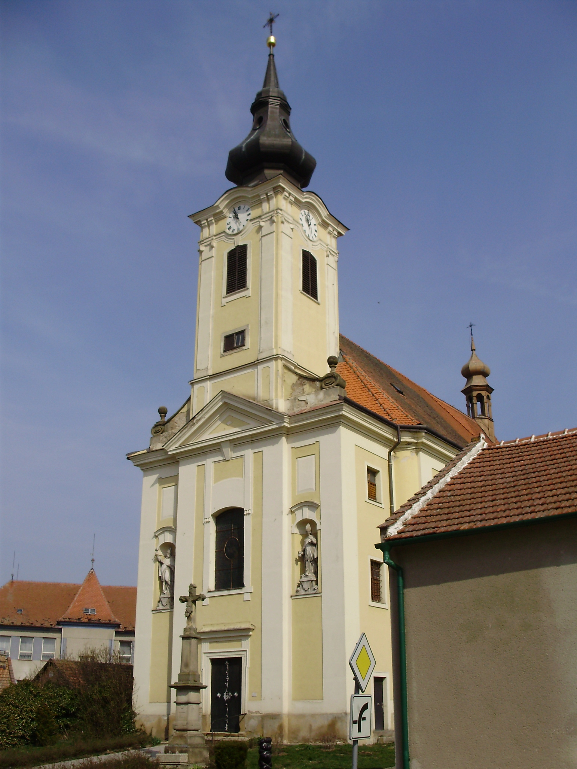 Farní kostel „Sv. Jakuba Většího a Matouše“